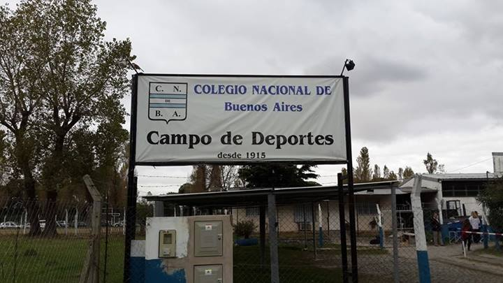 Colegio Nacional de Buenos Aires - Campo de deportes, cartel.